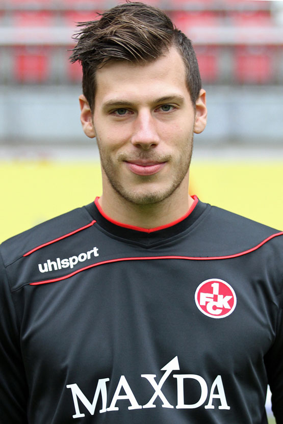 Marius Müller